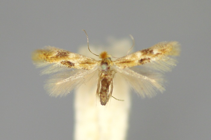 Bucculatrix ulmella